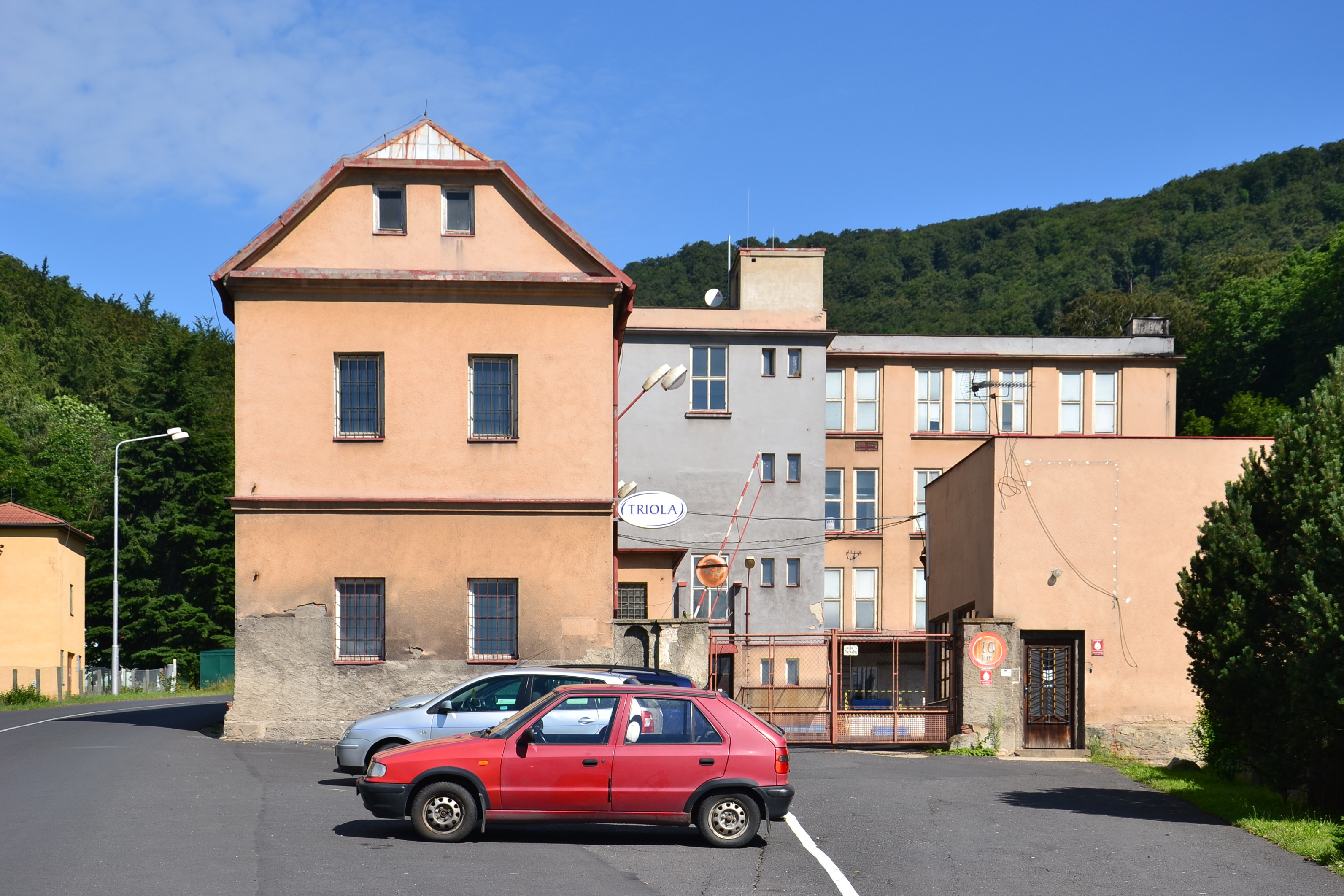 Továrna Trioly